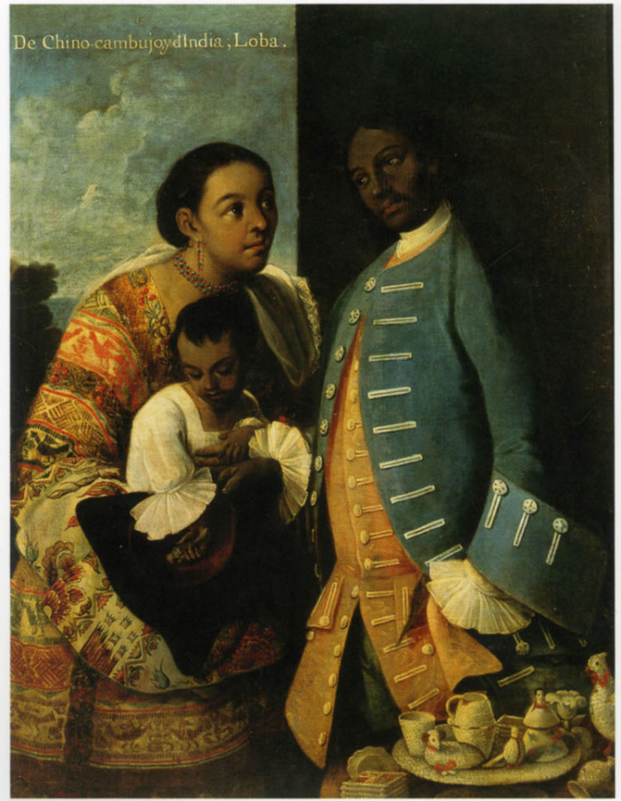 Pintura de Castas, 10. De chino cambujo e india – Loba.